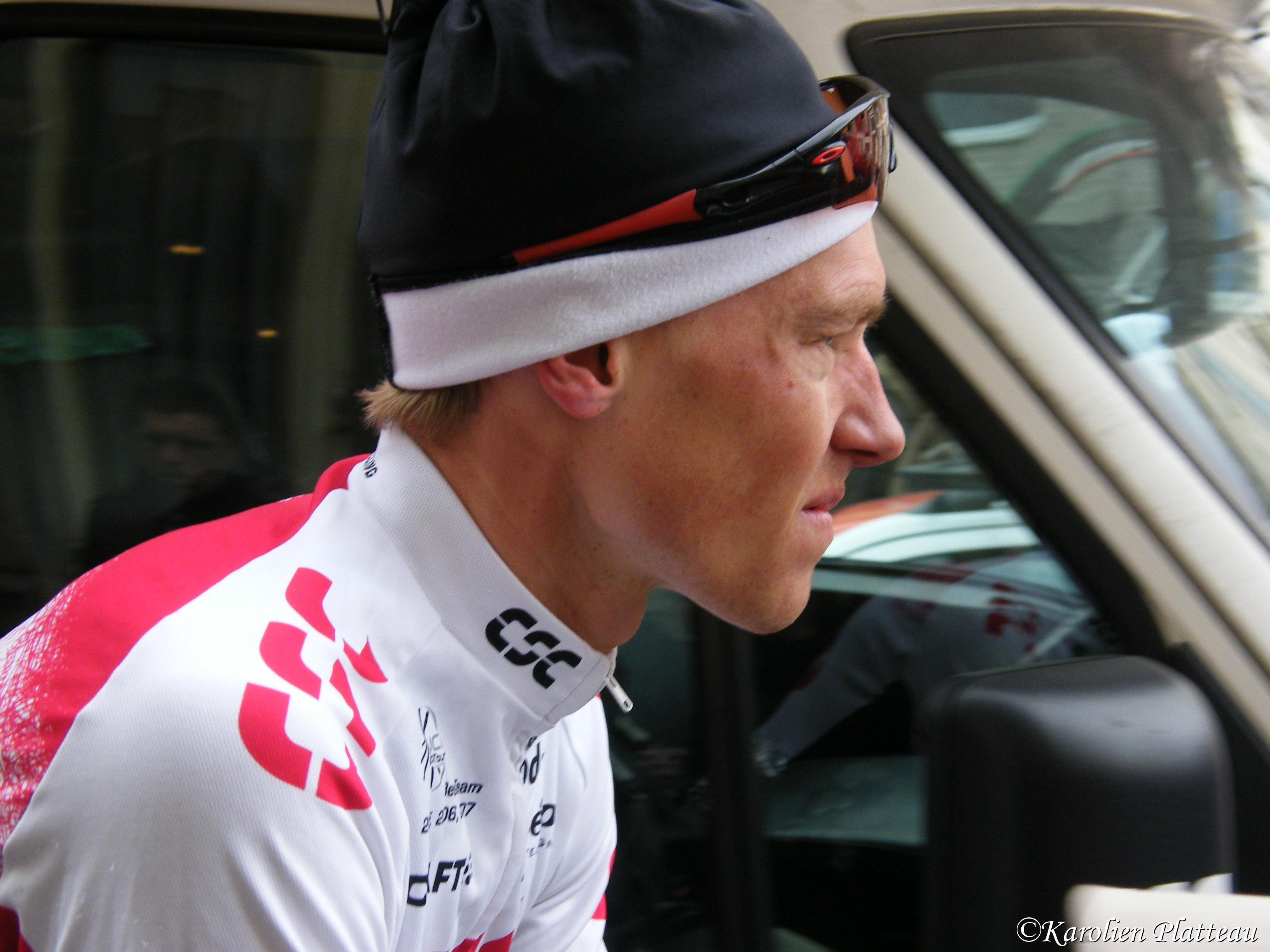 Marcus Ljungqvist - E3 prijs Harelbeke 2008